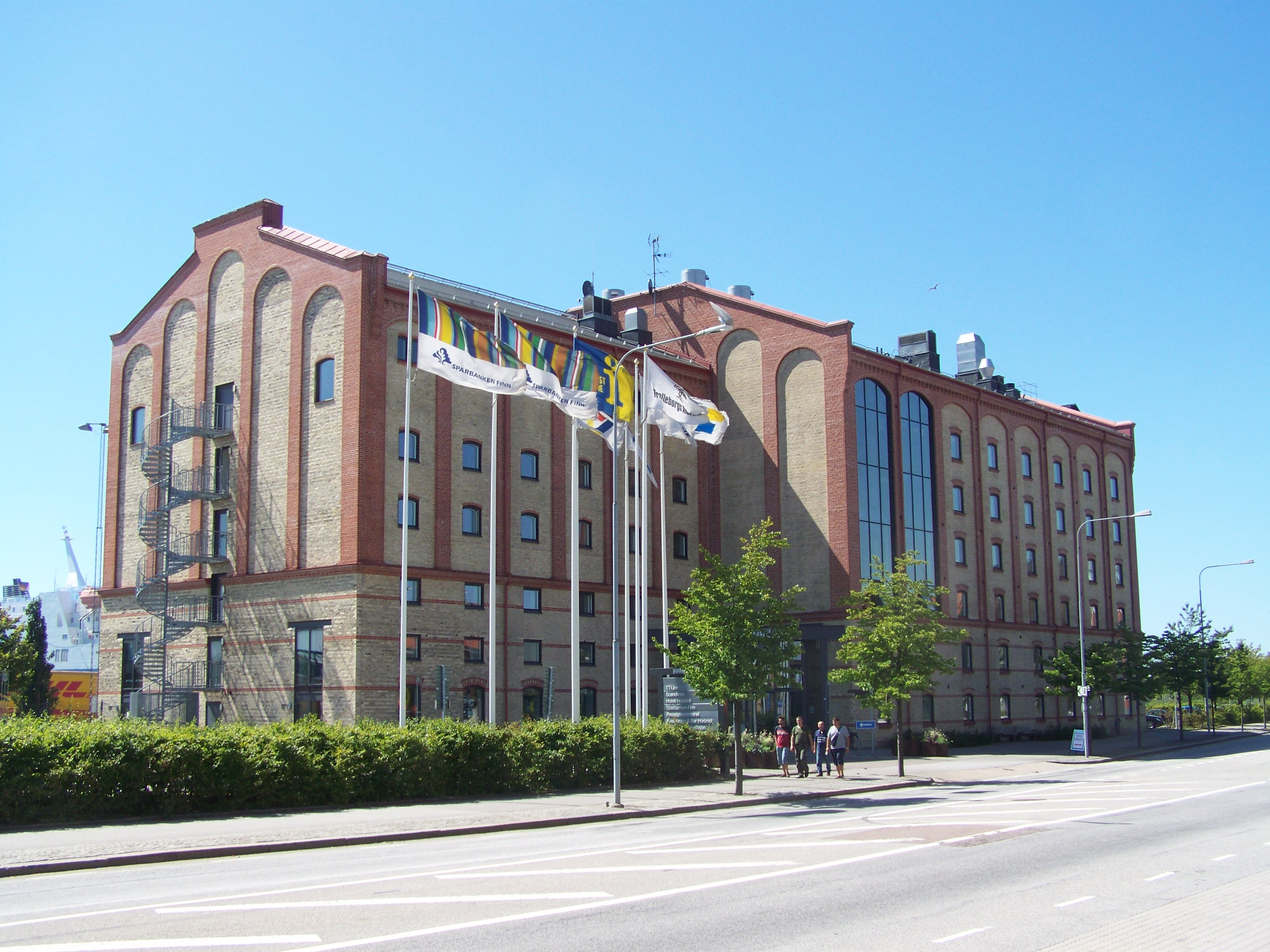 Trelleborg, Hafengebäude